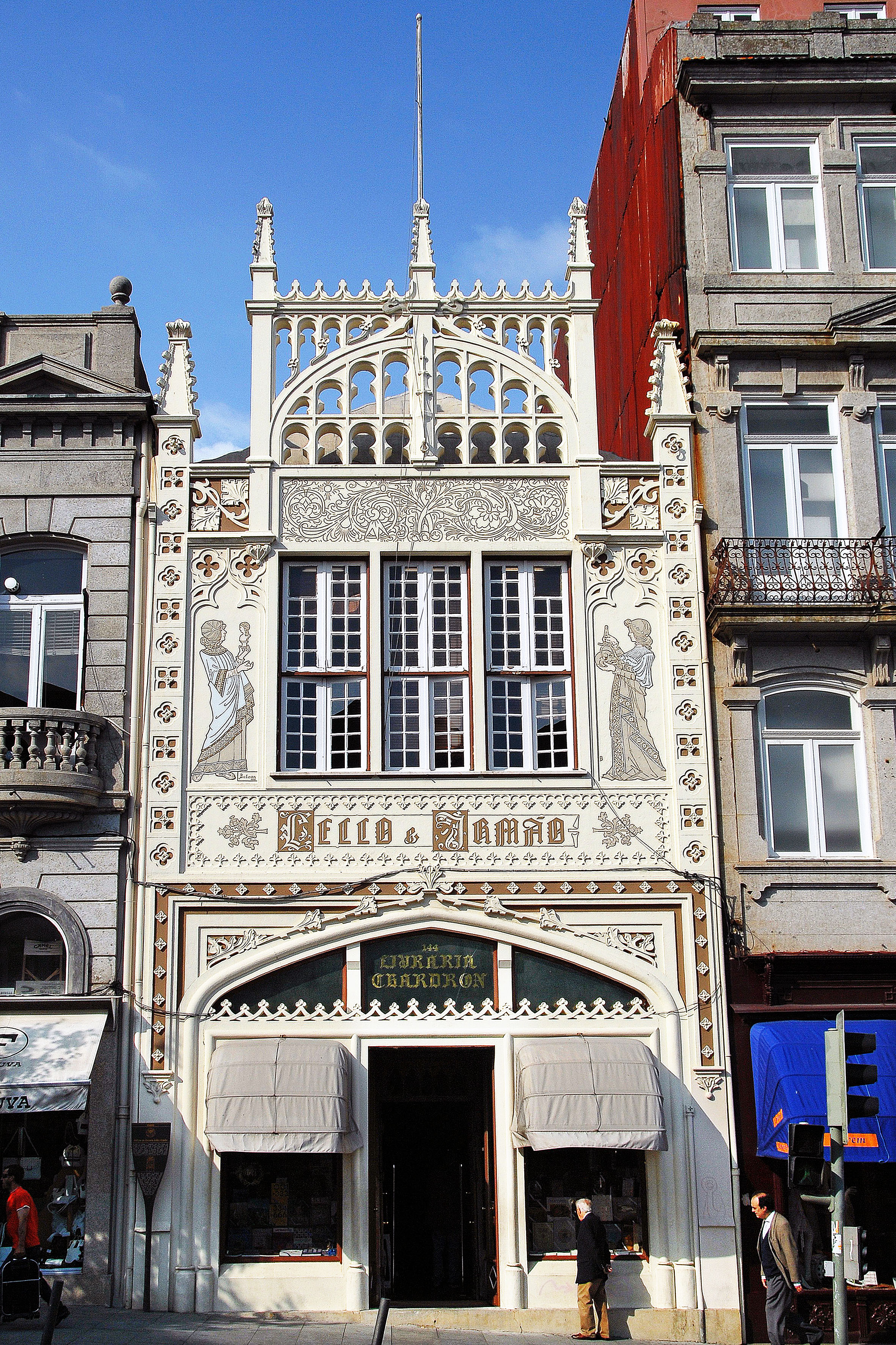 Livraria Lello e Irmão This file was uploaded for Wiki Loves Monuments in Portugal with the unique identifier 72272.